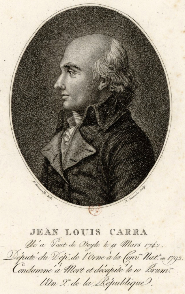 Jean Louis Carra : né à Pont de Veyle le 11 mars 1742. Député du département de l'Orne à la Convention nationale, estampe.